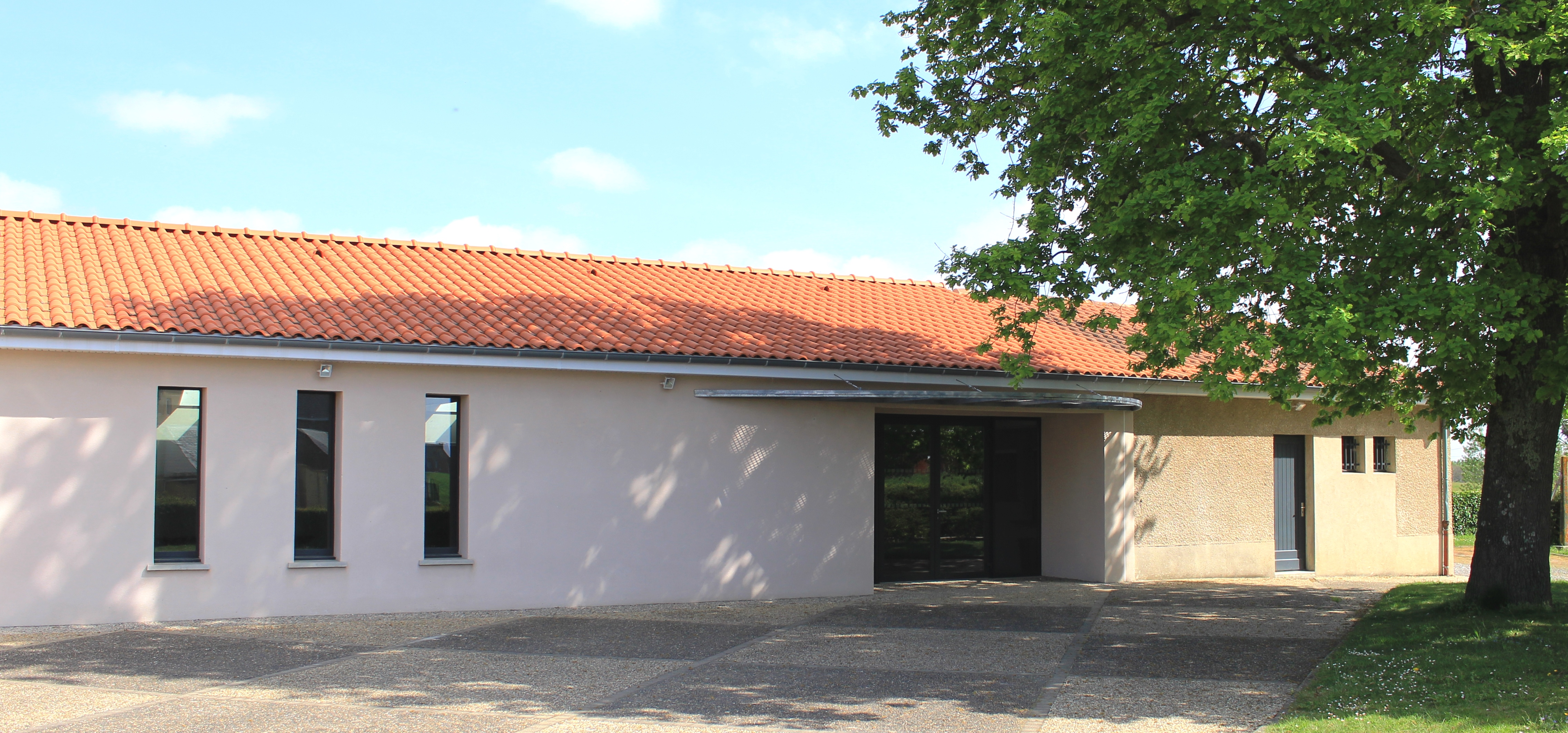 Salle des fêtes de Villenave-près-Béarn (Hautes-Pyrénées)